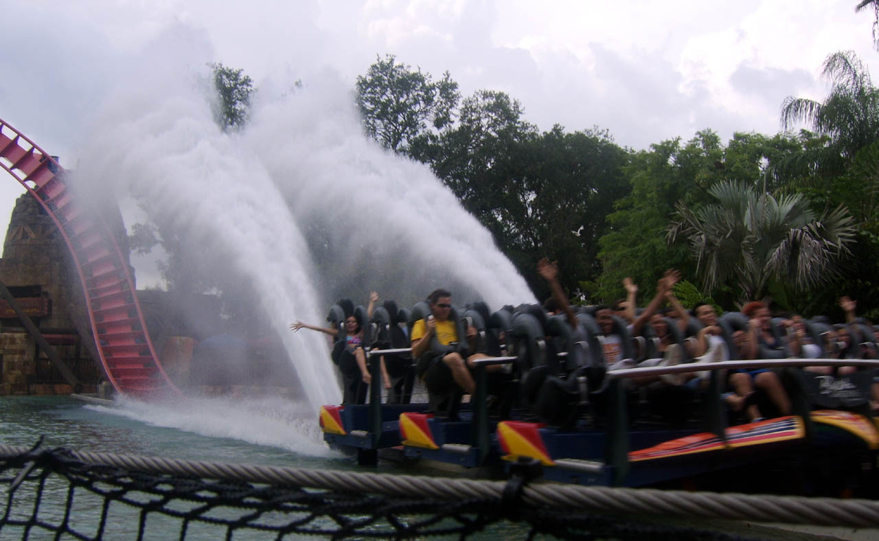 SheiKra , montagnes russes à Busch Gardens Africa